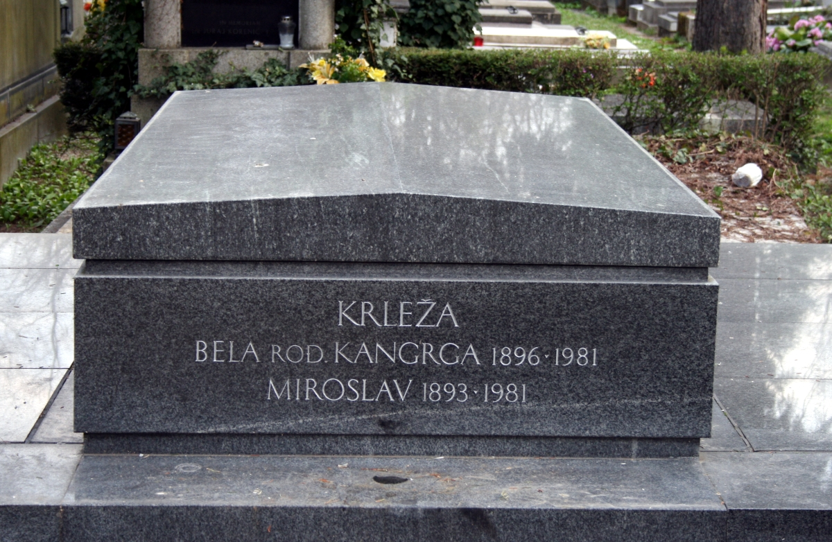 grob Miroslava i Bele Krleže na Mirogoju, Zagreb, Hrvatska